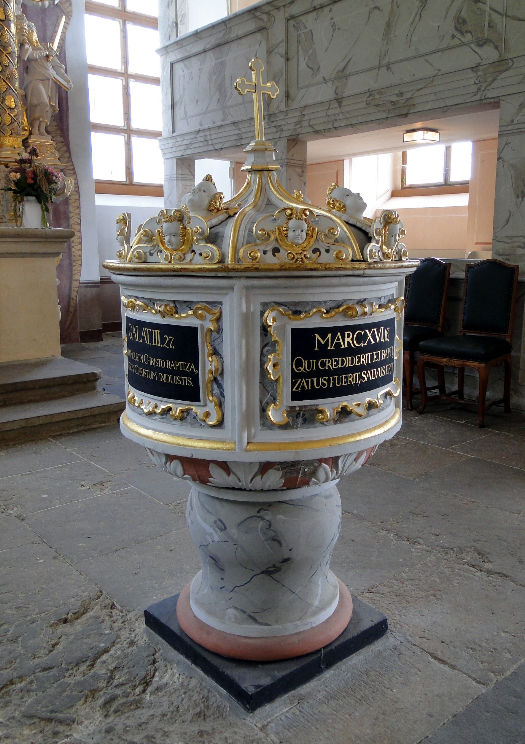 Die Weinbergkirche in Dresden-Pillnitz